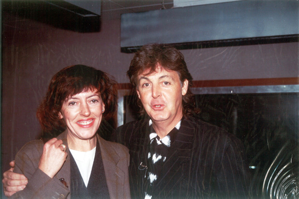 Intervista a Paul McCartney - settembre 1993